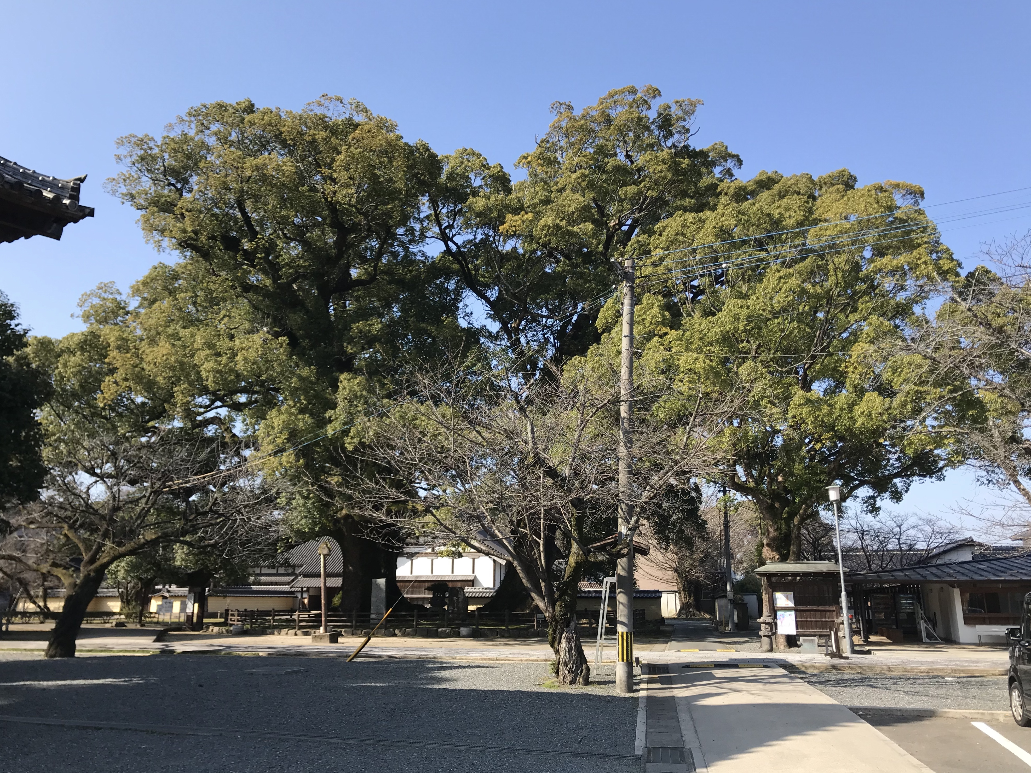 善導寺の大クス